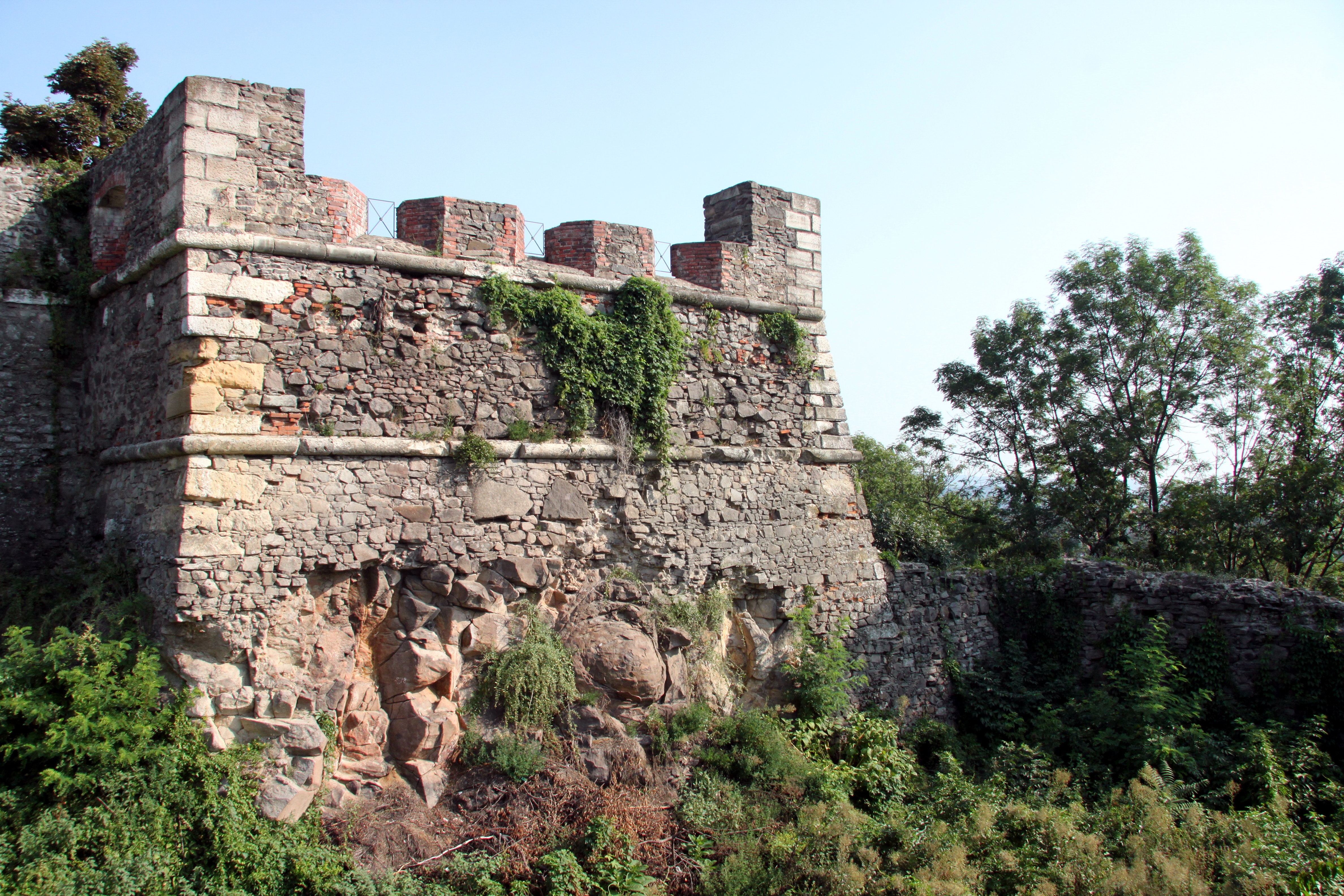 Замок-фортеця (мур.), вул.Капітульна, 33, Ужгород